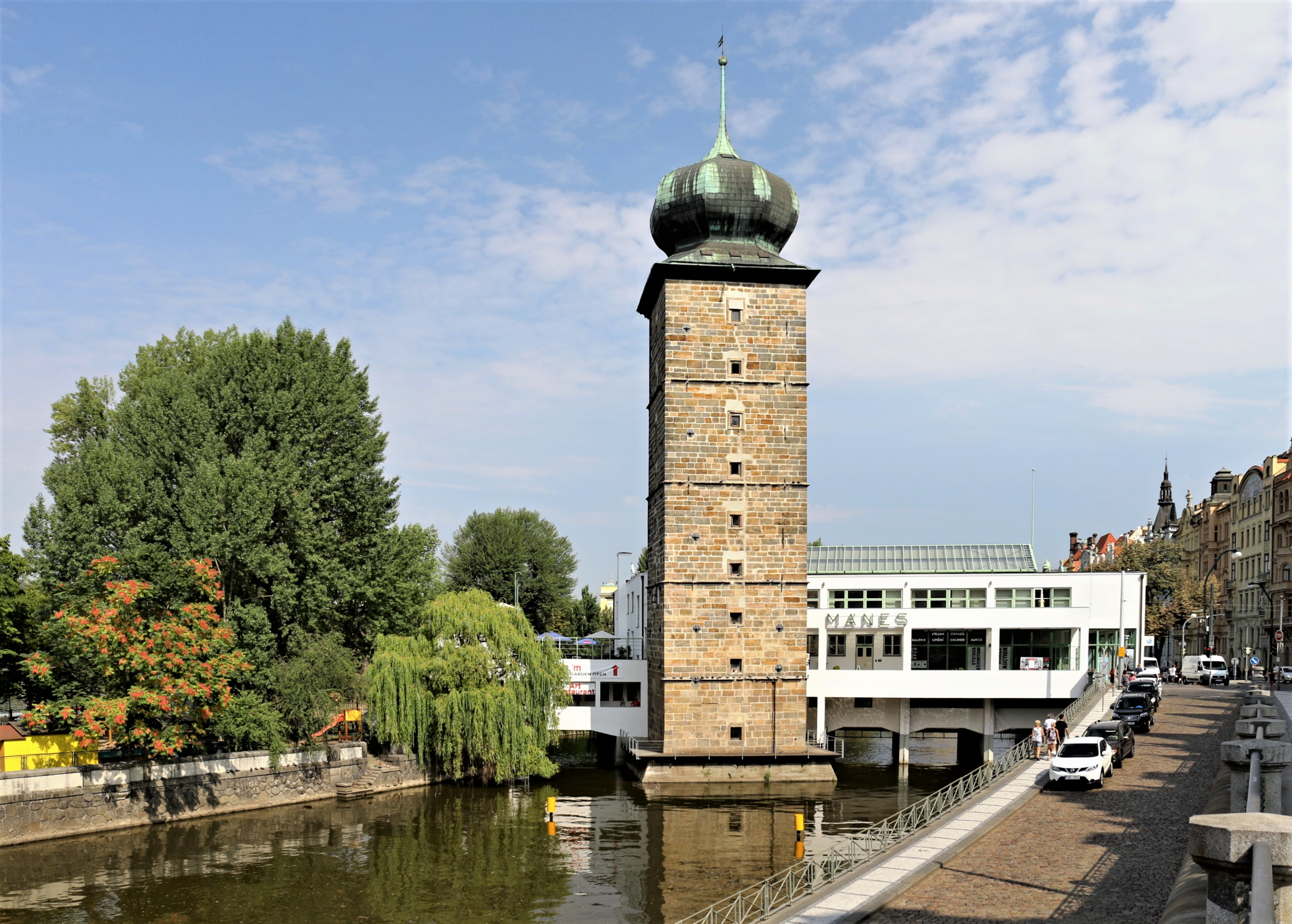 Galerie Mánes a Šítkovská věž